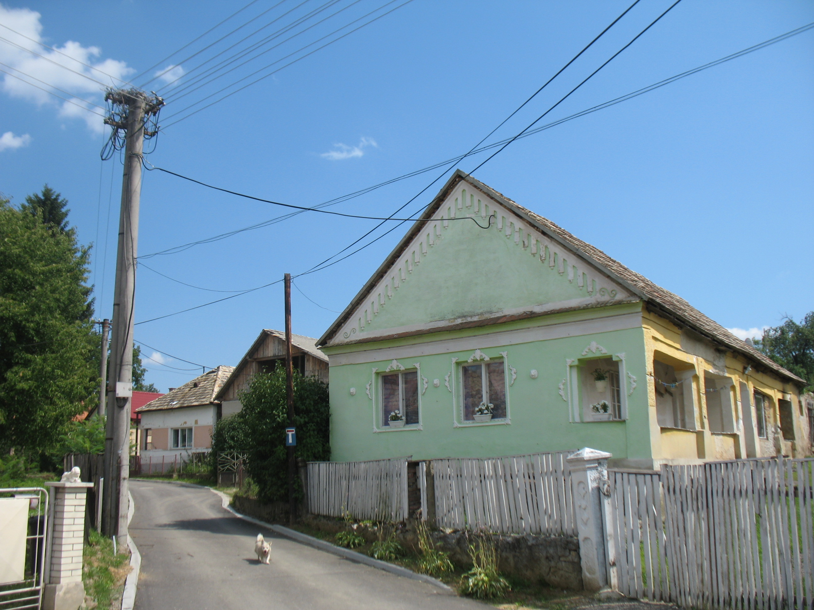 Csoltó